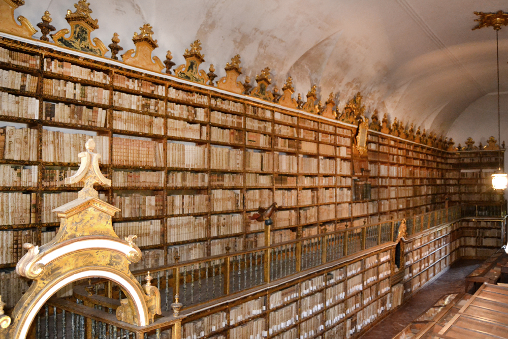 Biblioteca Capitular de la Catedral de Pamplona